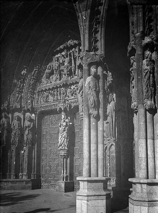 Imatge